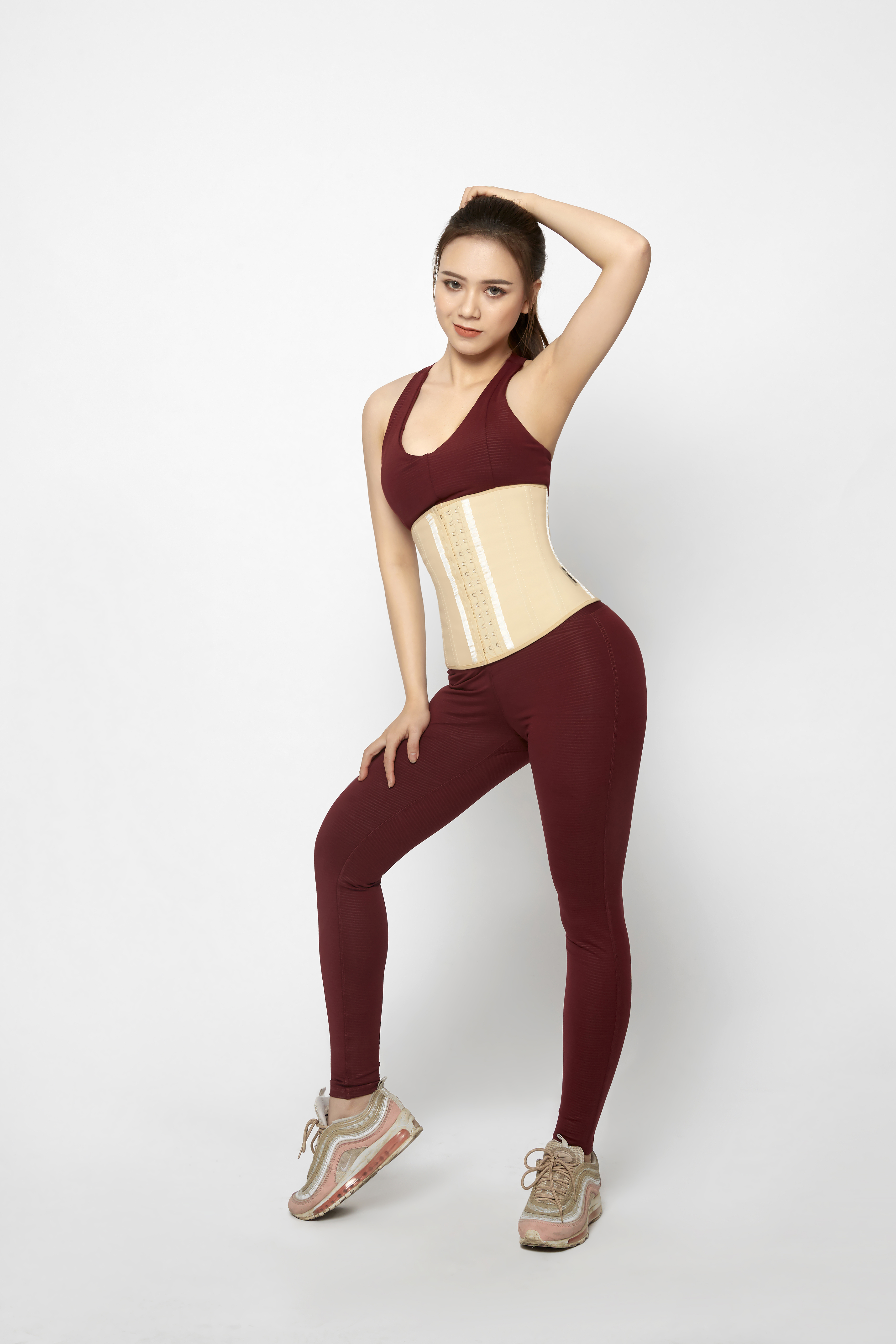 Chiều dài áo chỉ 26.5 cm, vạt trước dài hơn vạt sau ôm trọn bụng dưới. Áo có tác dụng giảm eo khi mặc thường xuyên, được sử dụng kết hợp tập thể dục để tăng hiệu quả